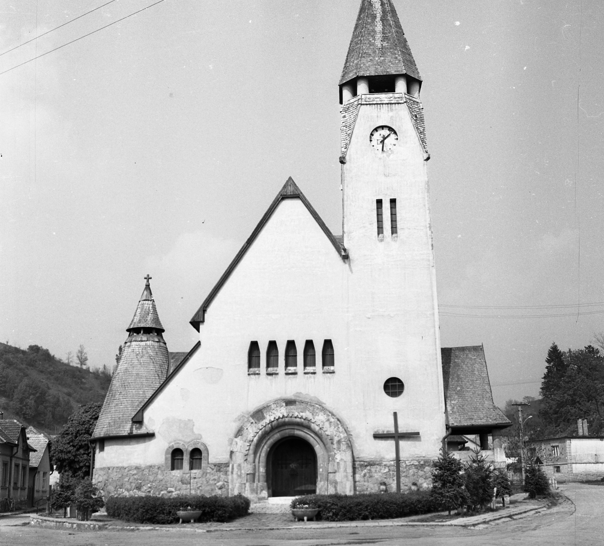 Havas Boldogasszony plébániatemplom (Kós Károly és Jánszky Béla) Location: Hungary, Zebegény Tags: church, building, cross, Secession, tower Title: Havas Boldogasszony plébániatemplom (Kós Károly és Jánszky Béla)